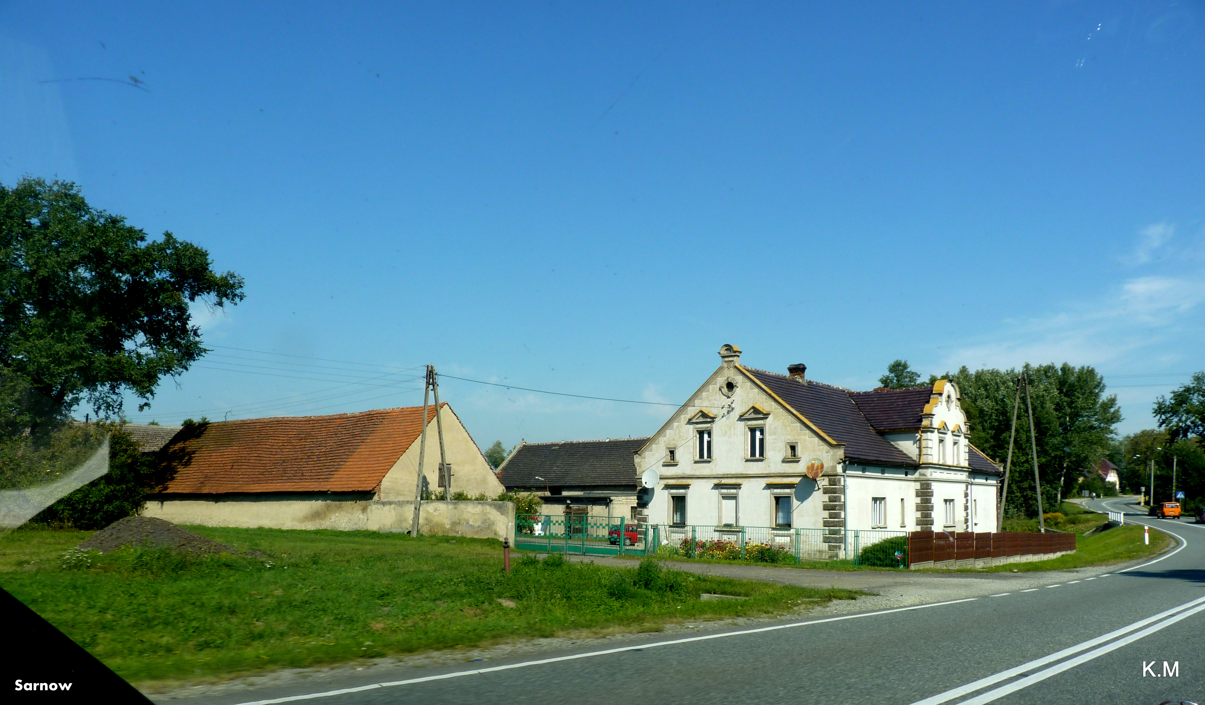 Sarnów